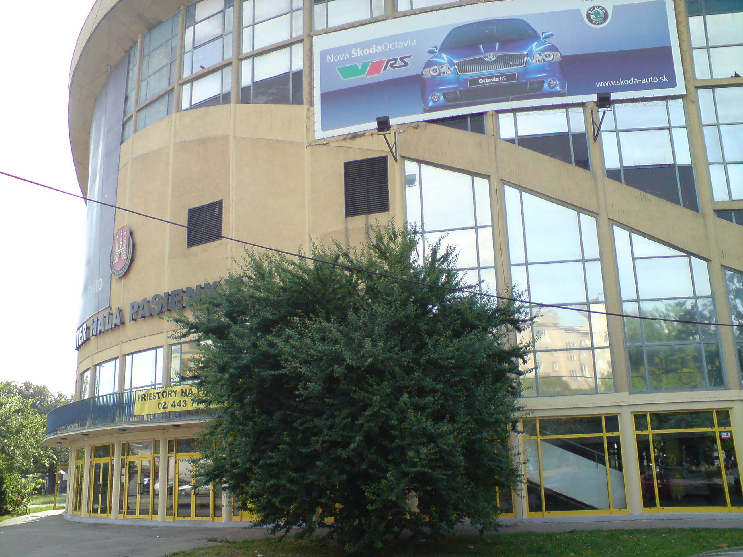 Hala na Pasienkoch